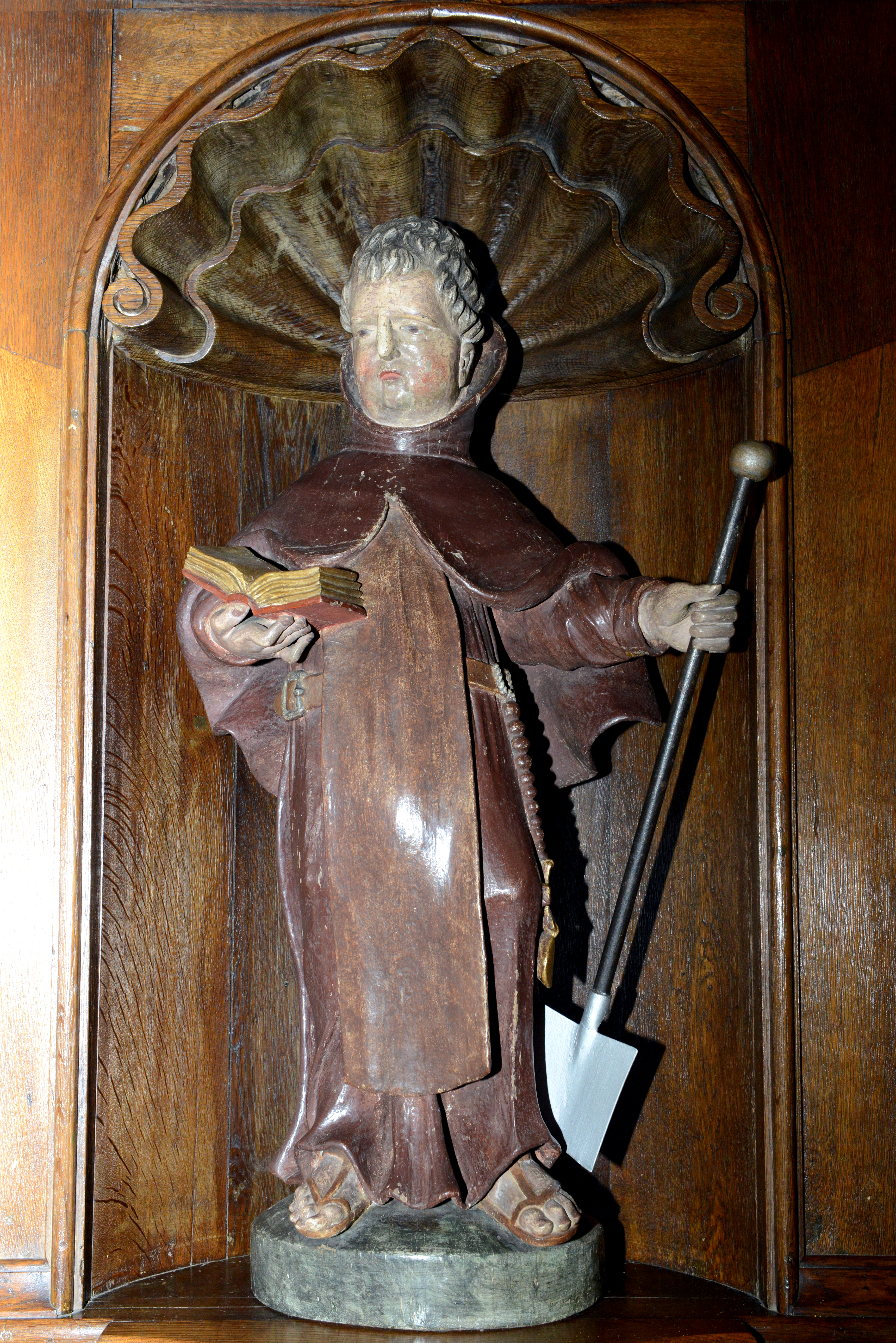 D'Statu vum Hellege Fiakrius um rietsen Niewenaltor an der Kierch zu Buerschent.